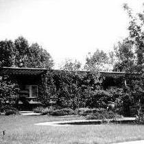 Bundesgartenschau 1957 in Köln - Hausgarten